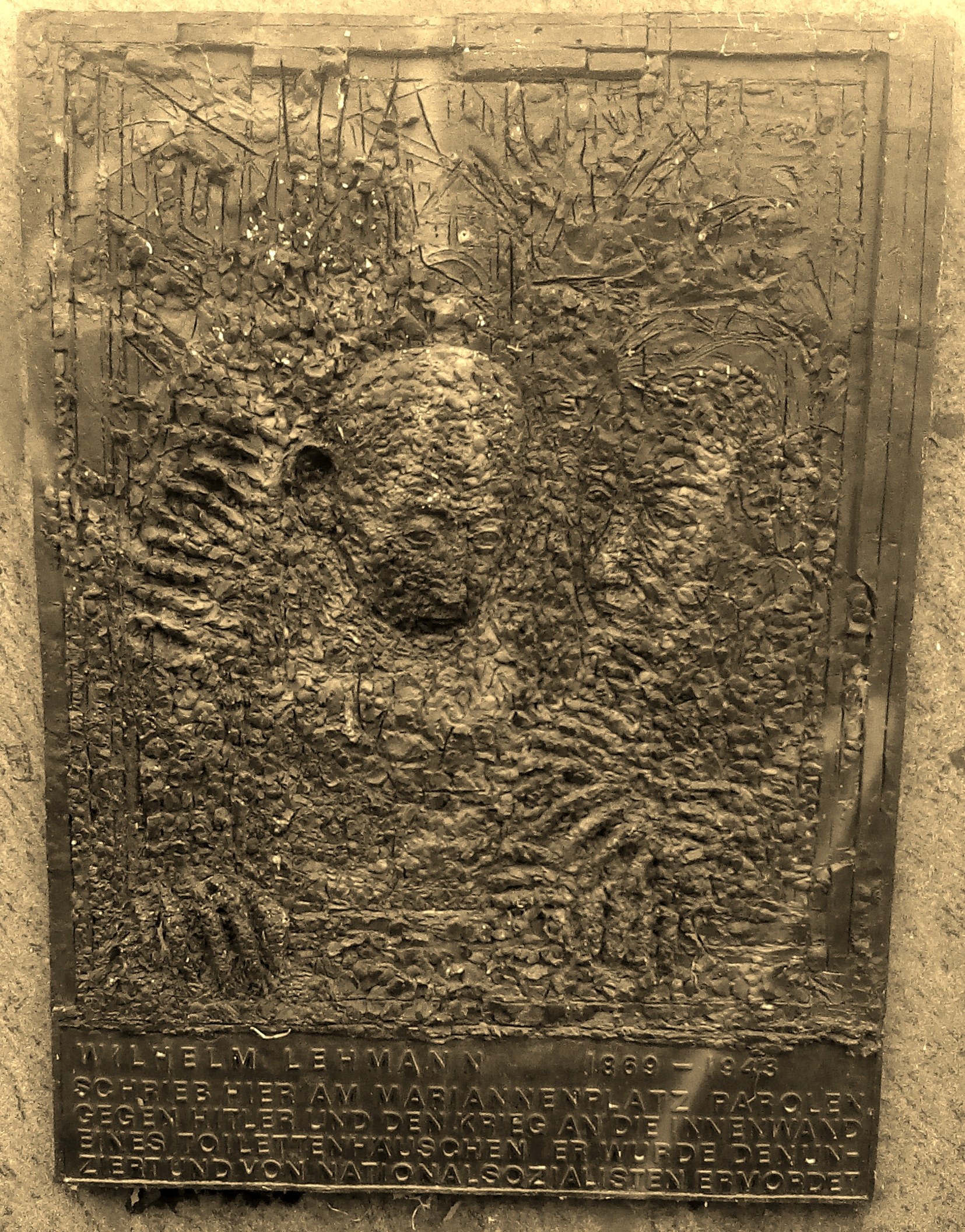 Seit 1990 erinnert eine Gedenkstele von Nikolaus Langhans an den von den Nationalsozialisten ermordeten Kreuzberger Widerstandskämpfer Wilhelm Lehmann (1869-1943). Standort: im Nordwesten des Berliner Mariannenplatzes